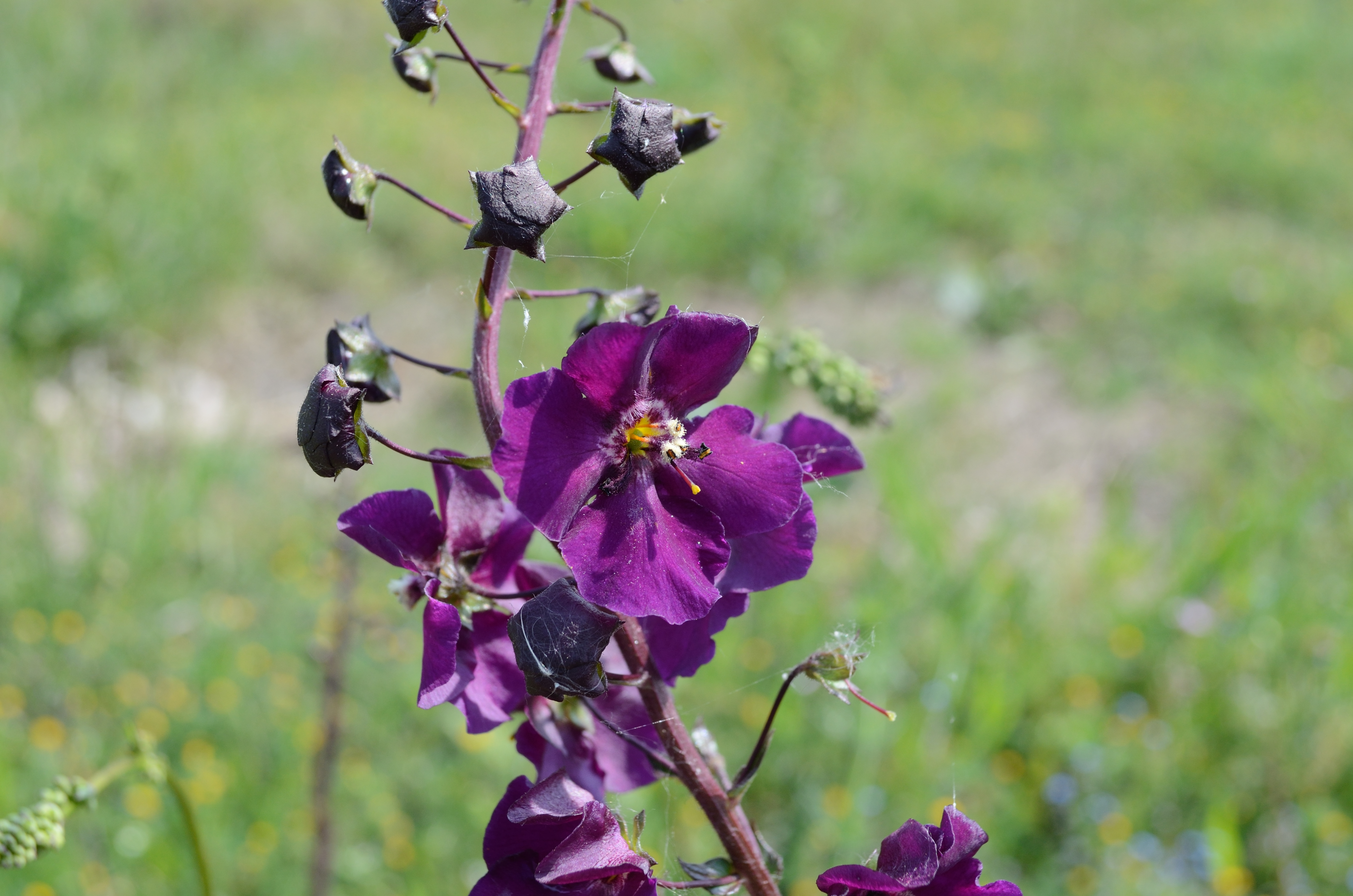 Violette Königskerze Seewinkel